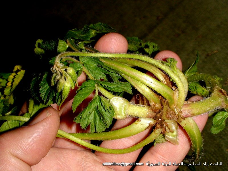 نباتات برّية سورية تؤكل